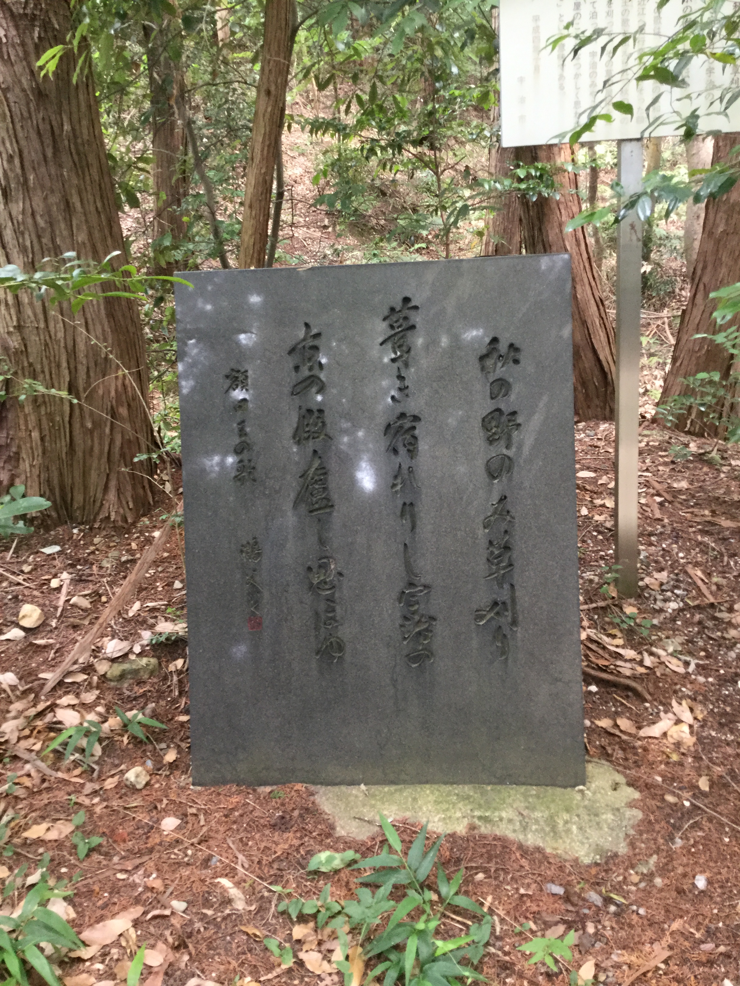 下居神社にある額田王の歌碑